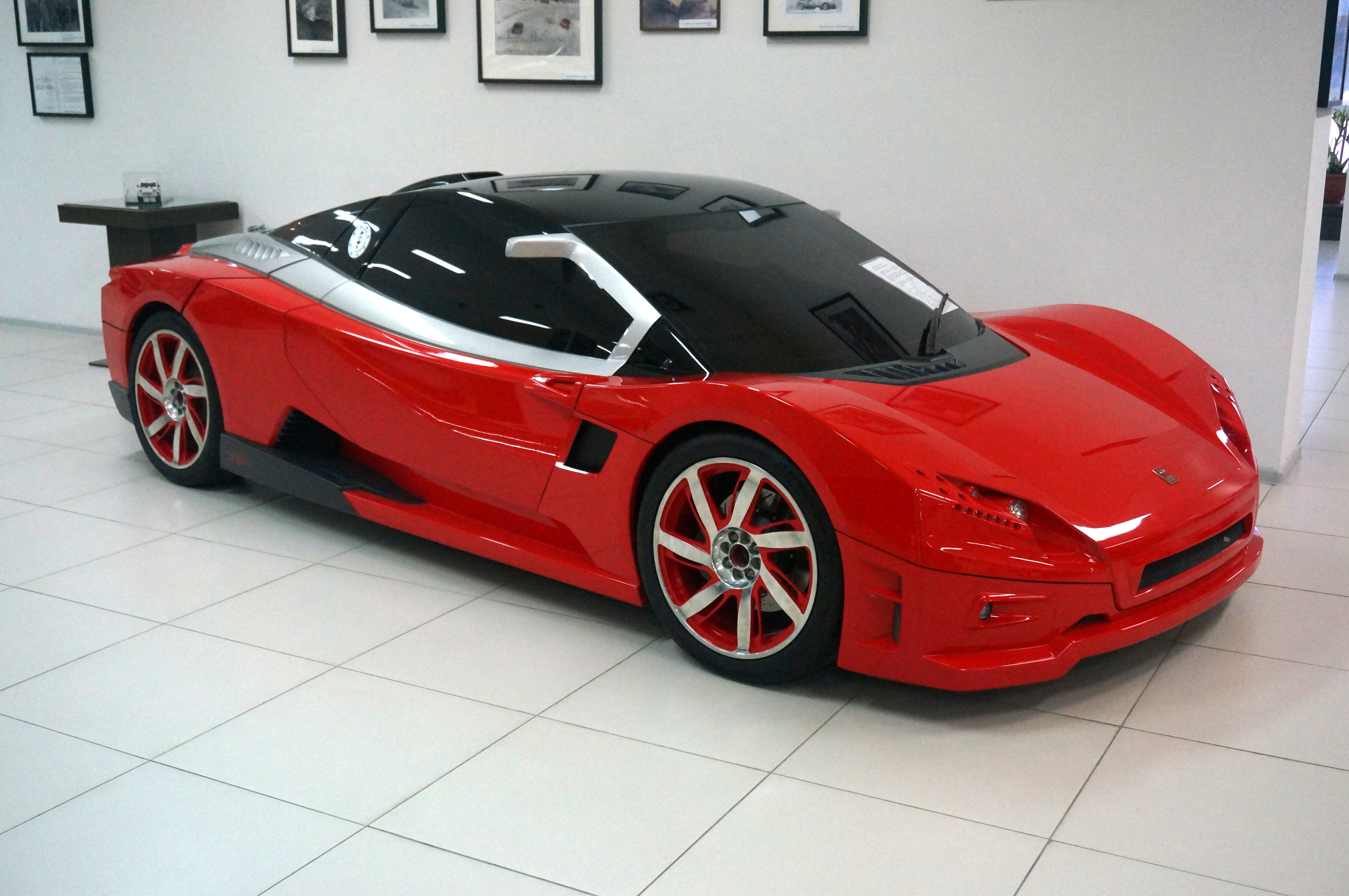 Спортивный концепт-кар Lada Revolution III в музее АвтоВАЗа